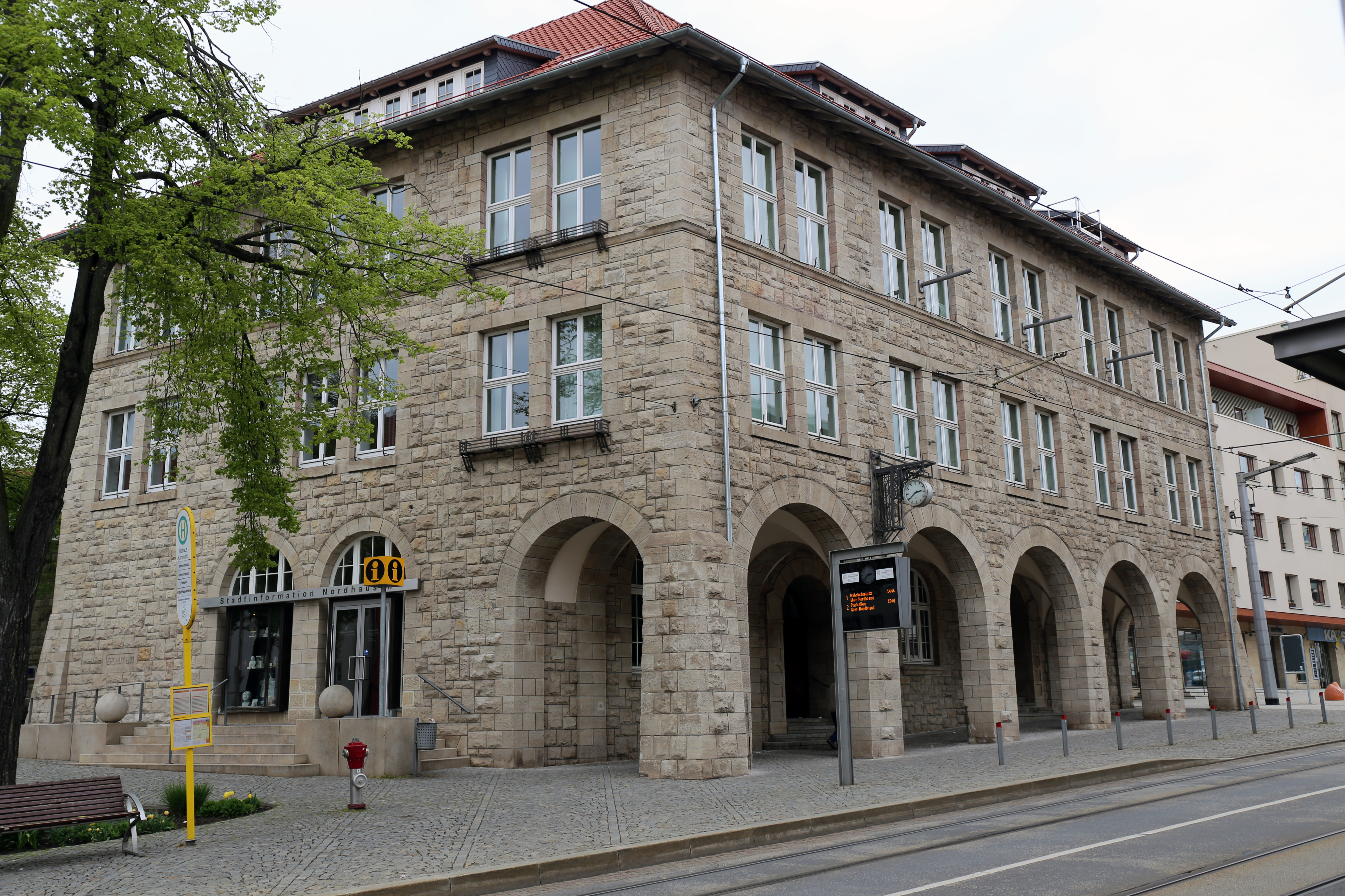 Stadthaus in Nordhausen im Mai 2015